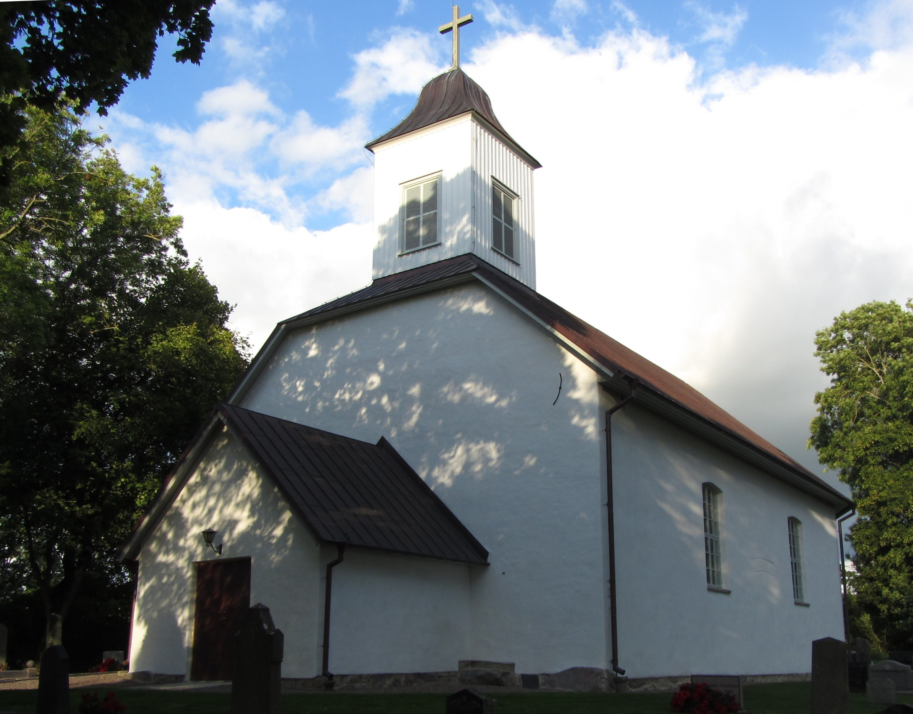 Ledsjö kyrka söder om Götene i södra Götene kommun, nära gränsen till Skara kommun norr om Skara i Västergötland.